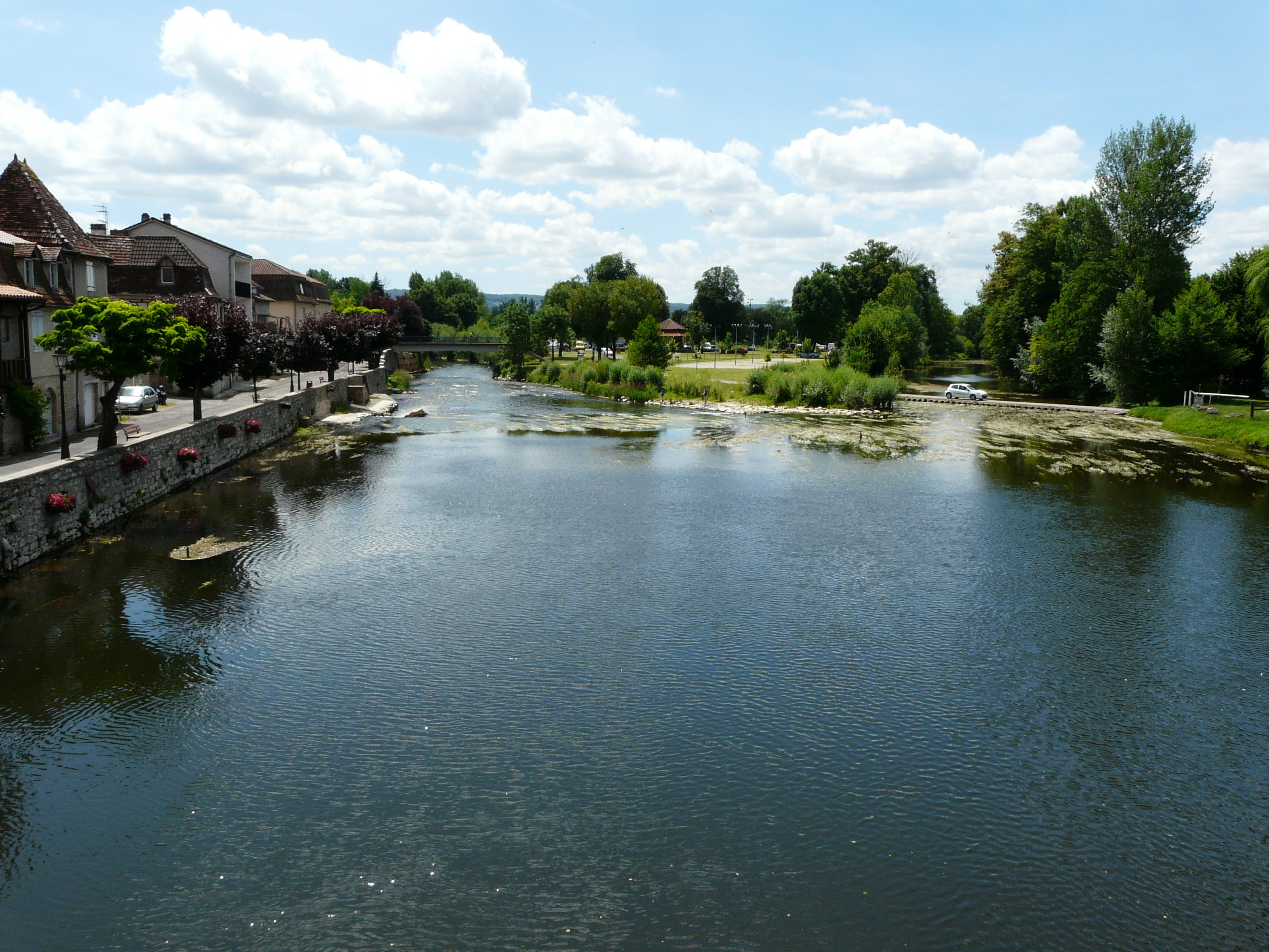 La Cère en aval du pont de la route départementale 940, Bretenoux, Lot, France.